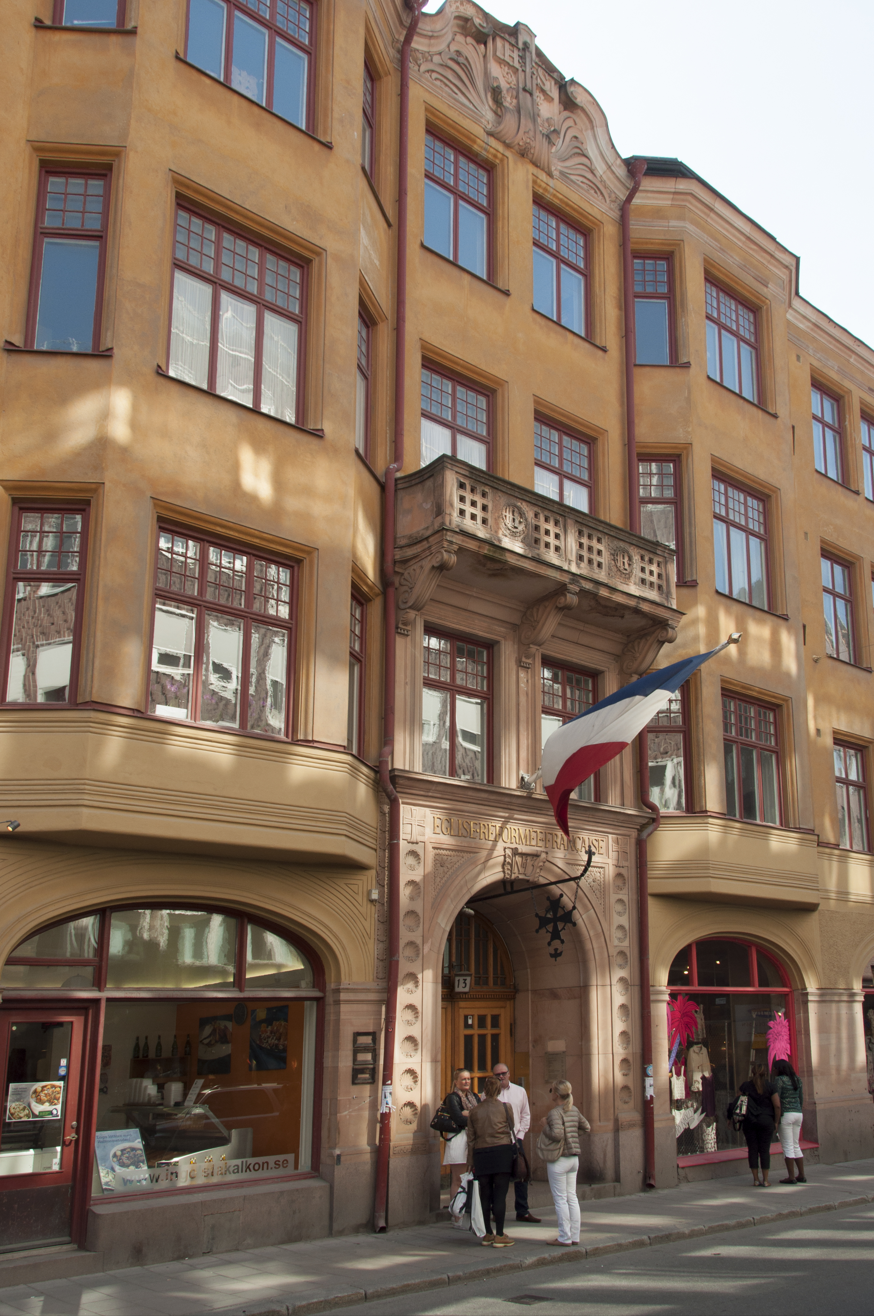 Franska reformerta församlingens hus, kv. Sperlingens Backe 61 (f.d. 24) Humlegårdsgatan 13, 15, Byggnadsår 1904-06, arkitekt Rudolf Arborelius, byggherre Franska reformerta församlingen, byggmästare P Sundahl.